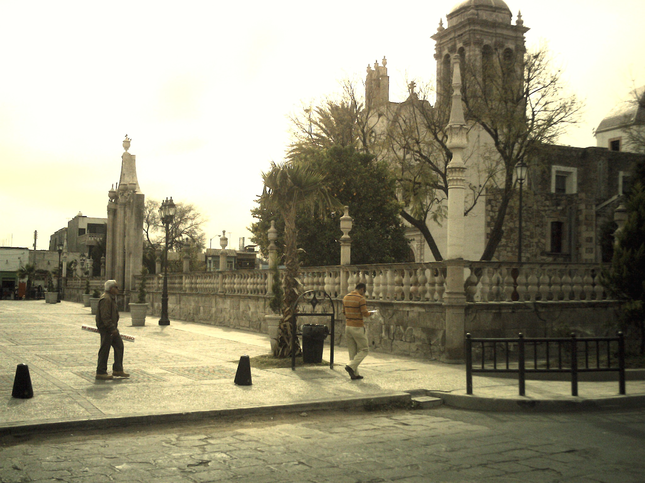 Jardin